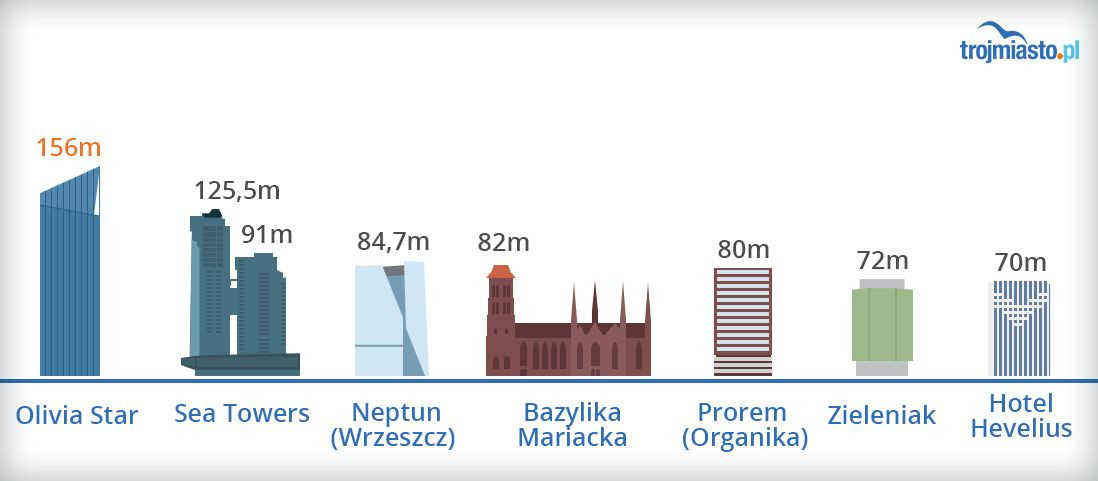 Grafika z najwyższymi budynkami w 3mieście